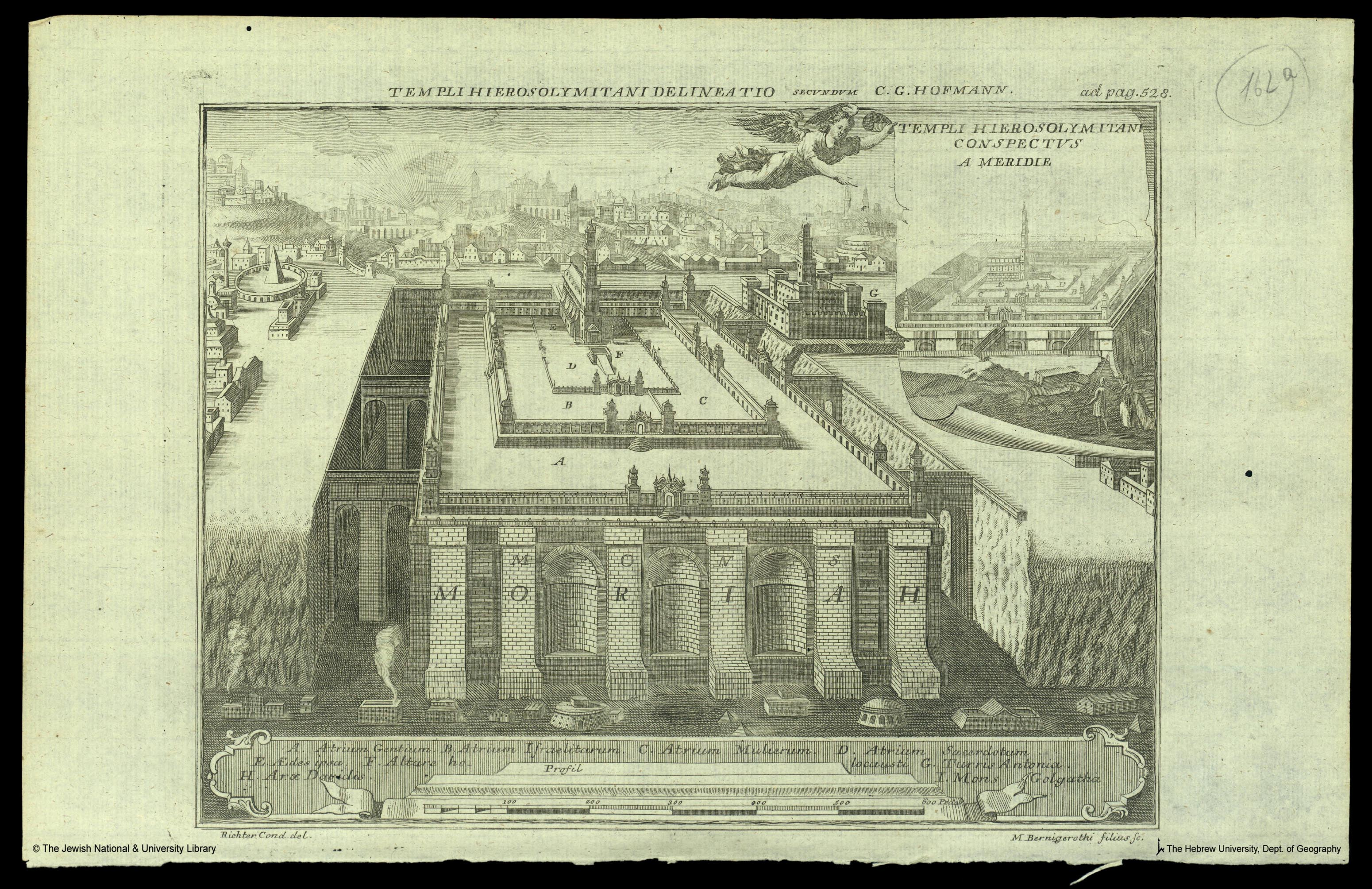 Templi Hierosolymitani delineatio, Christian G. Hoffmann (1692-1735)